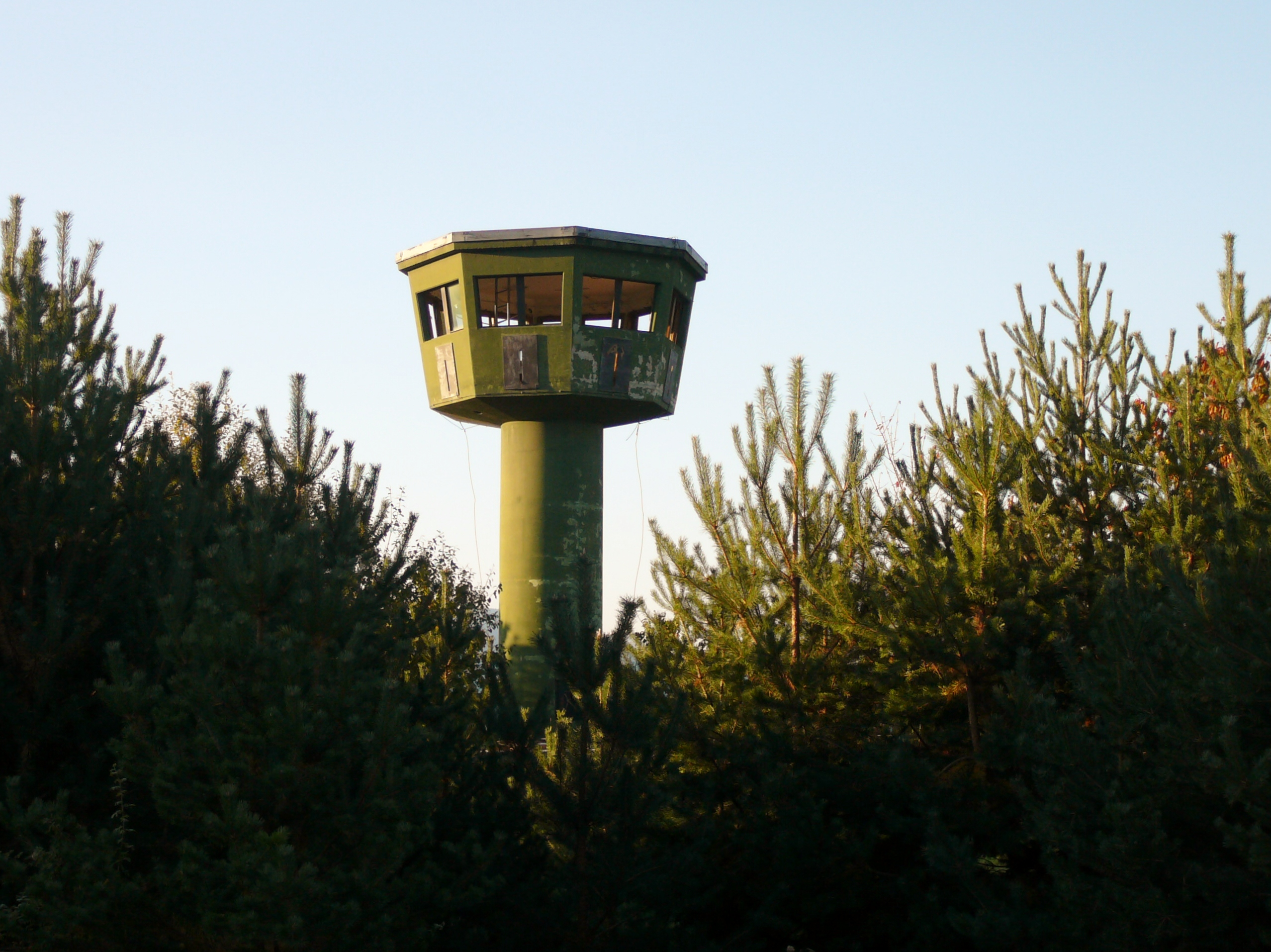 Site Rigel